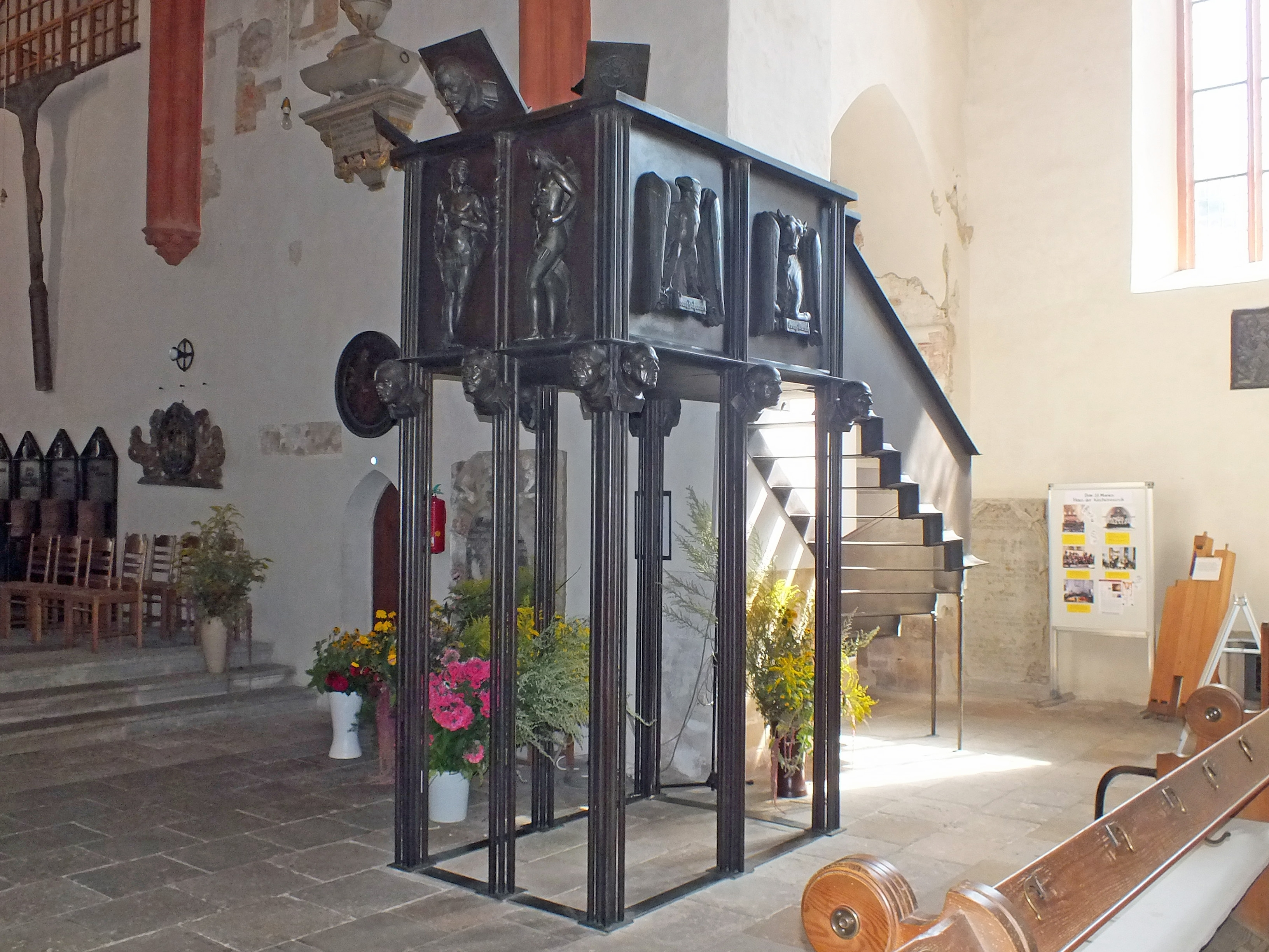 Die Kanzel von Georg Wrba (1932) im Dom St. Marien zu Wurzen